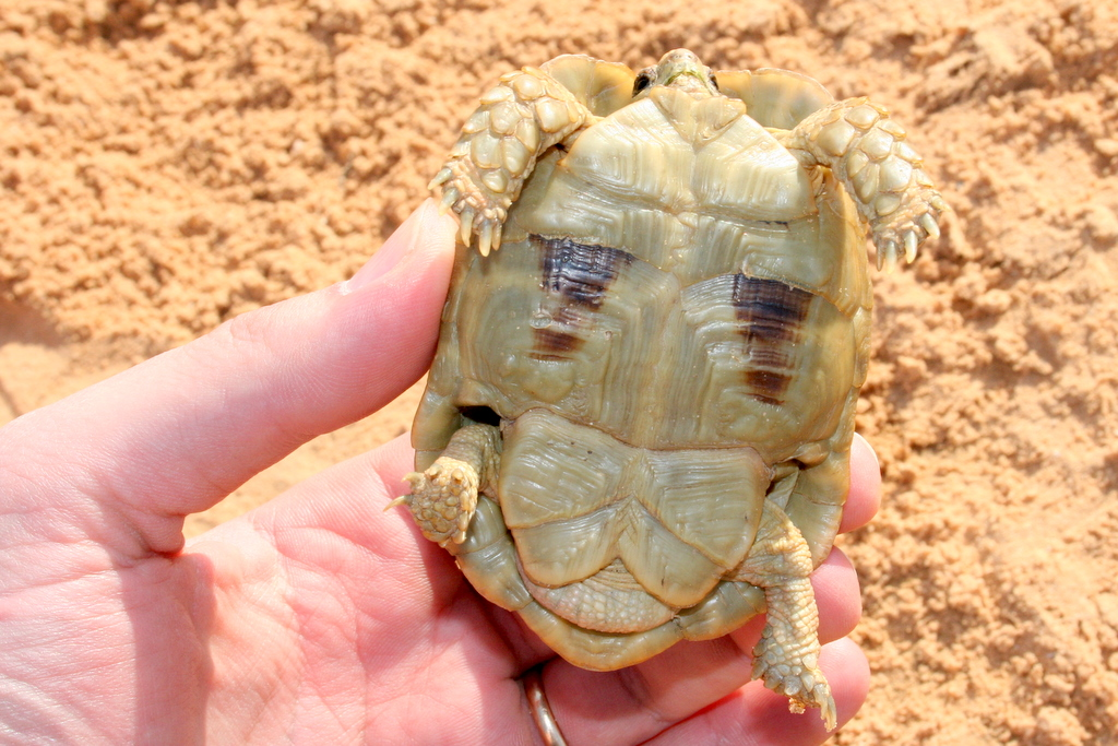 Testudo kleinmanni bottom - Tortle found in the Negev desert in Israel Tortue photographiée dans le désert du Neguev December 2006